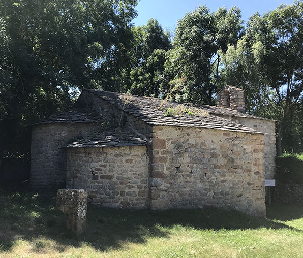 Part exterior posterior de l'esglèsia mostrant els dos absis.